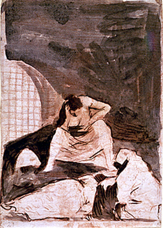 Dibujos preparatorios de los Caprichos